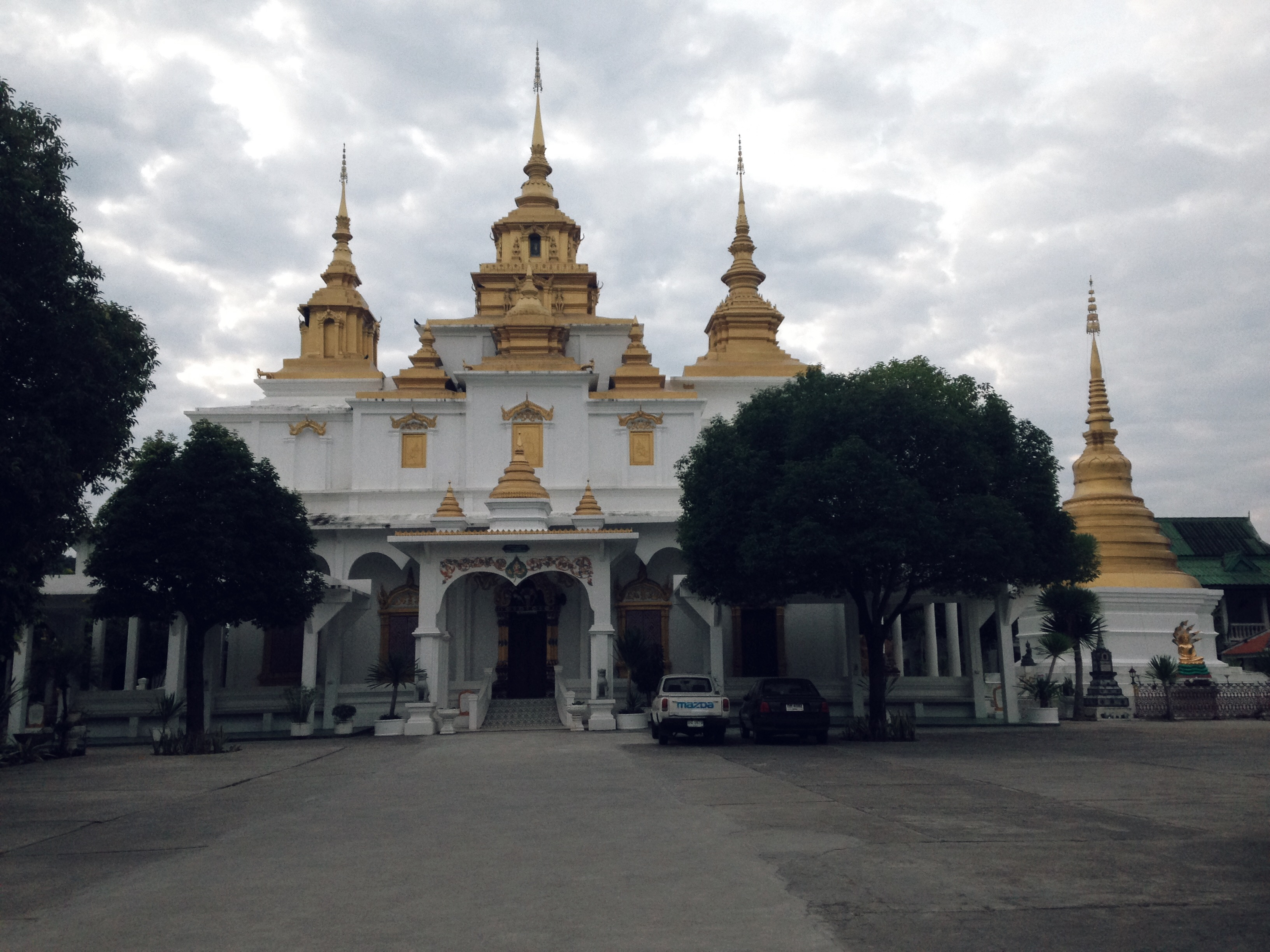 พระอุโบถวัดเชตวันลำปาง ศิลปการออกแบบครึ่งไทยครึ่งพม่า